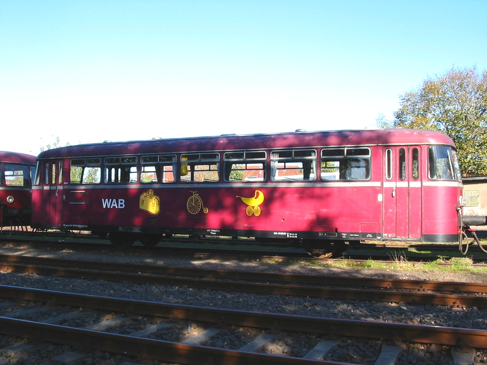 ehemaliger Schienenbus 796 der Almetalbahn (WAB), hier in nichtöffentlicher Nachnutzung in Hagenow